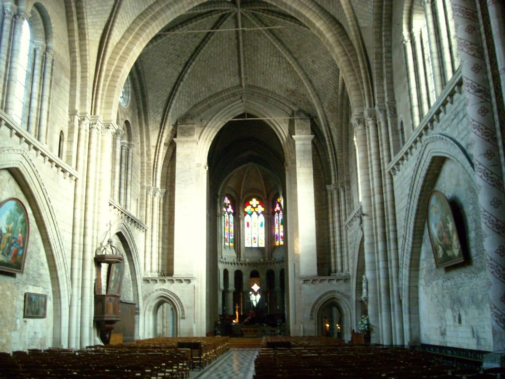 Vue générale intérieure de l'église Notre-Dame de la Couture